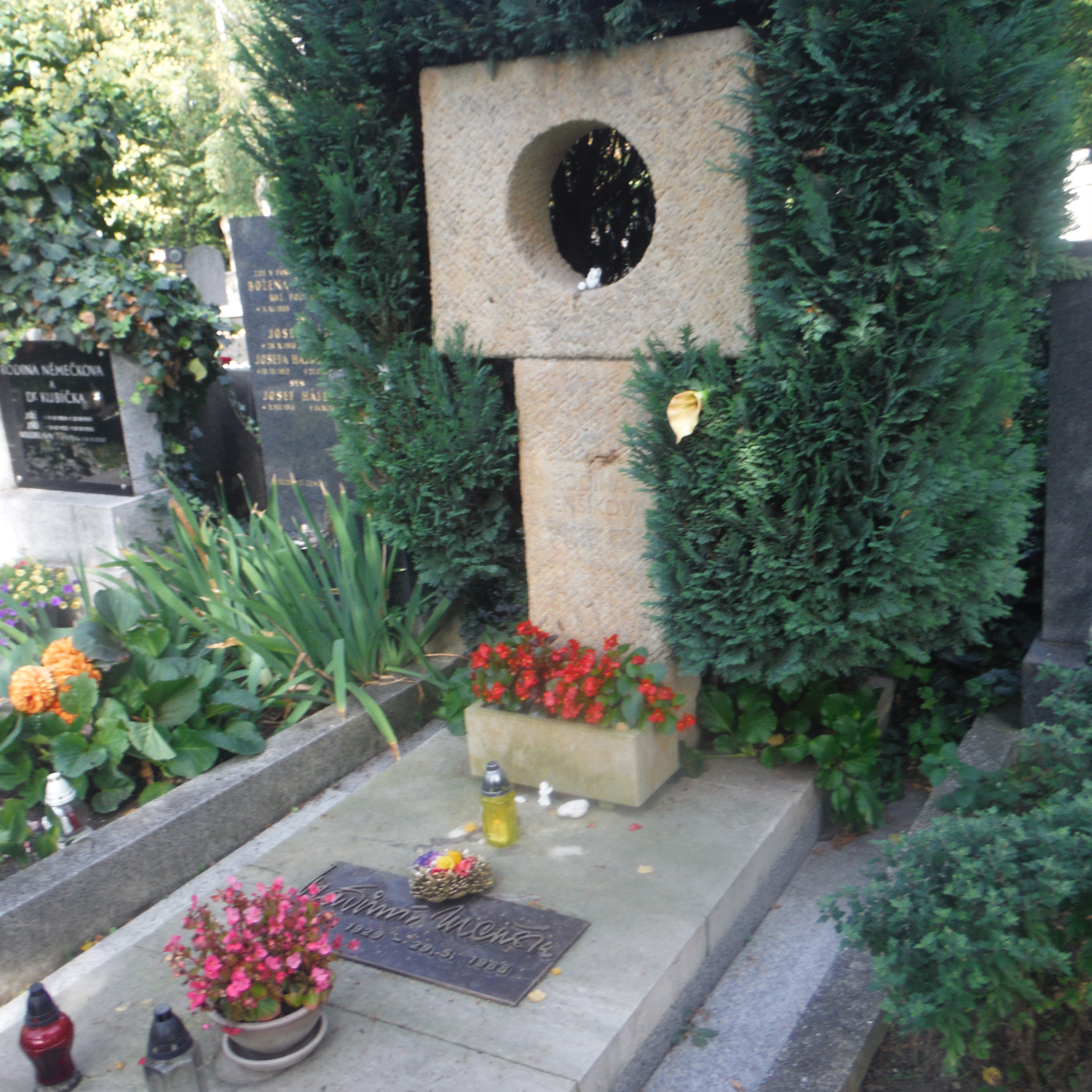 hrob